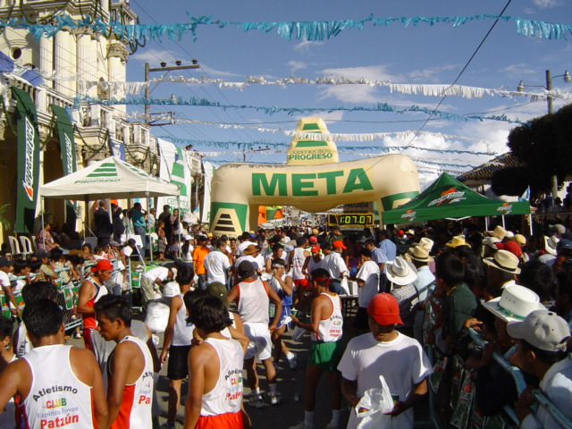 foto de la carrera independencia en patzun